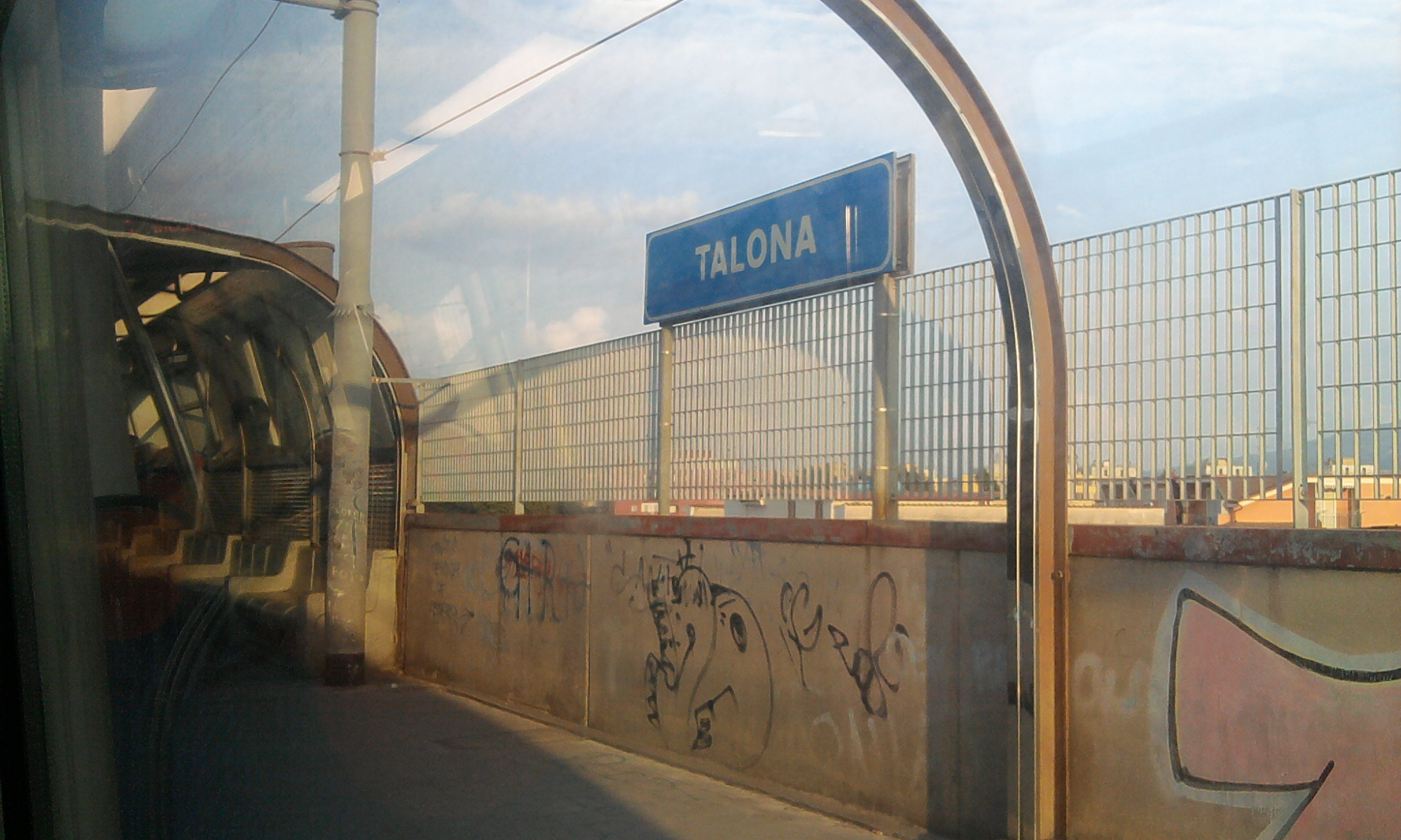 La Stazione di Talona